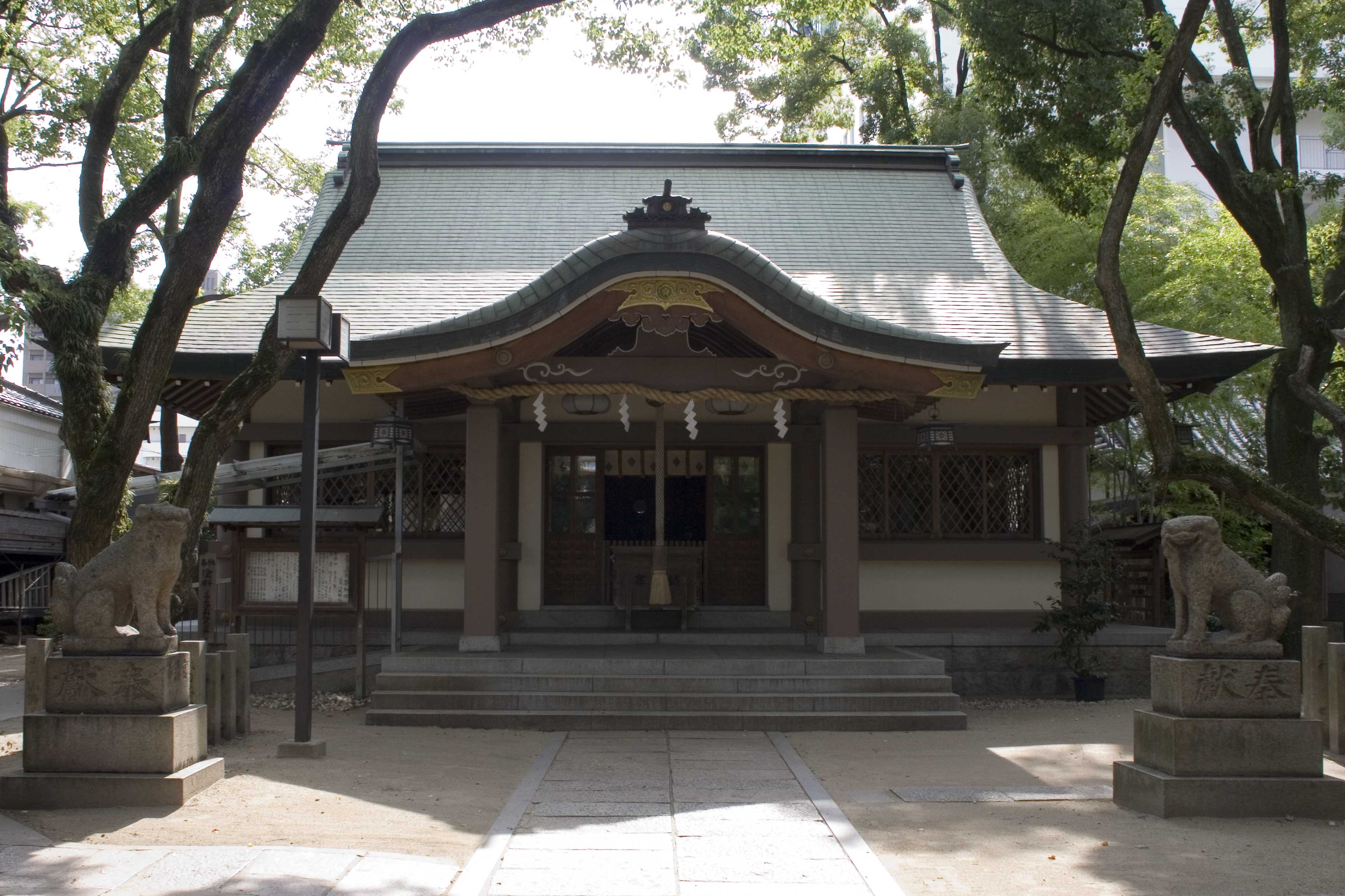 素盞烏尊神社 (大阪市) 拝殿